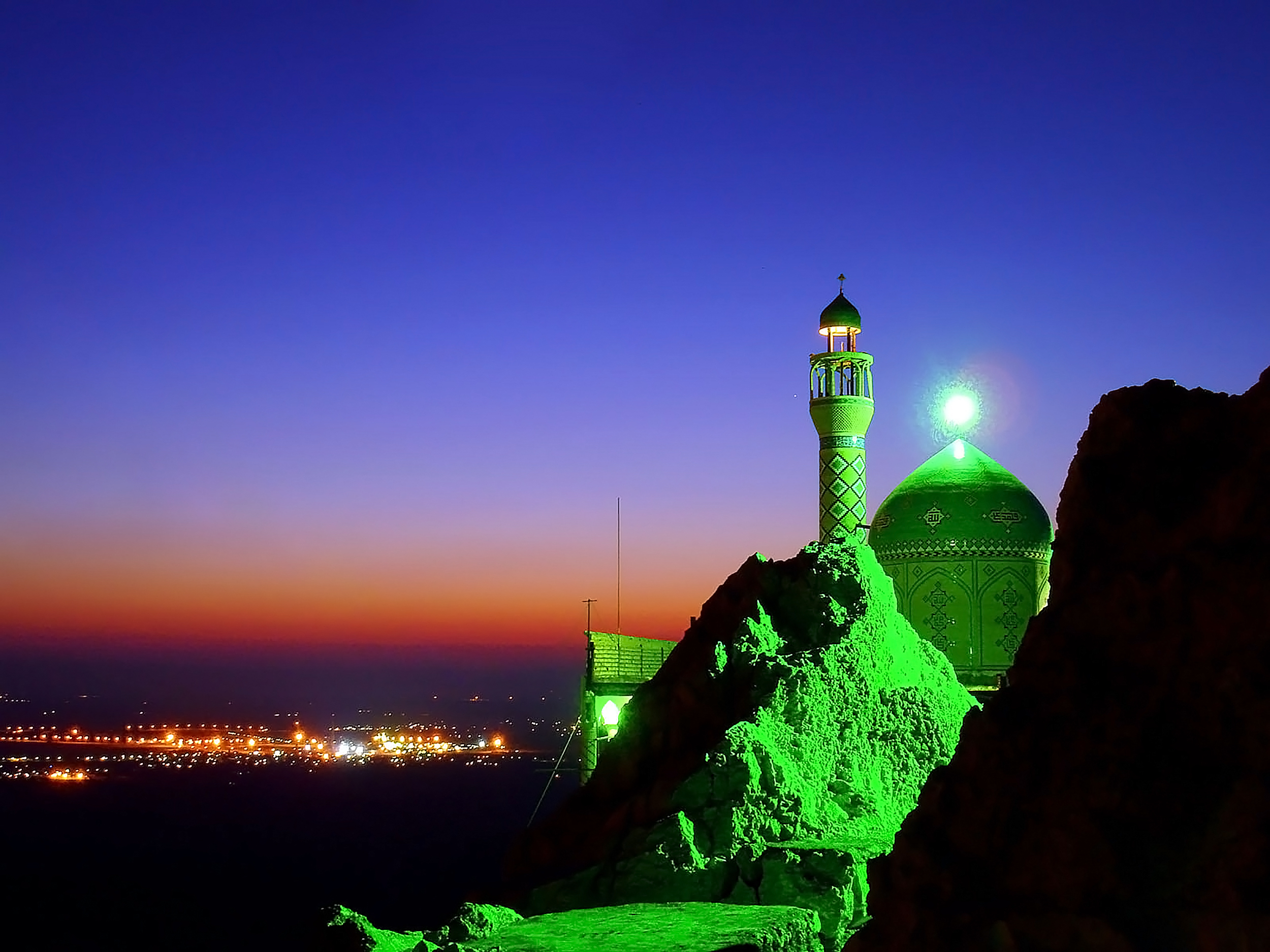 عکاسی در شب، به عکاسی در فضای آزاد در ساعات شب گفته می‌شود. عکاسی در شب، معمولاً با دیافراگمهای بسته و زمان‌های نوردهی طولانی انجام می‌شود. در این عکاسی نقاط نورانی متحرک به صورت خطی نورانی و کشیده در صفحه حساس عکاسی ضبط می‌شود.